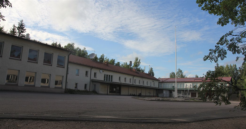 Korson koulu pihaa. Korson koulu on Vantaan Korsossa toimiva yläkoulu.